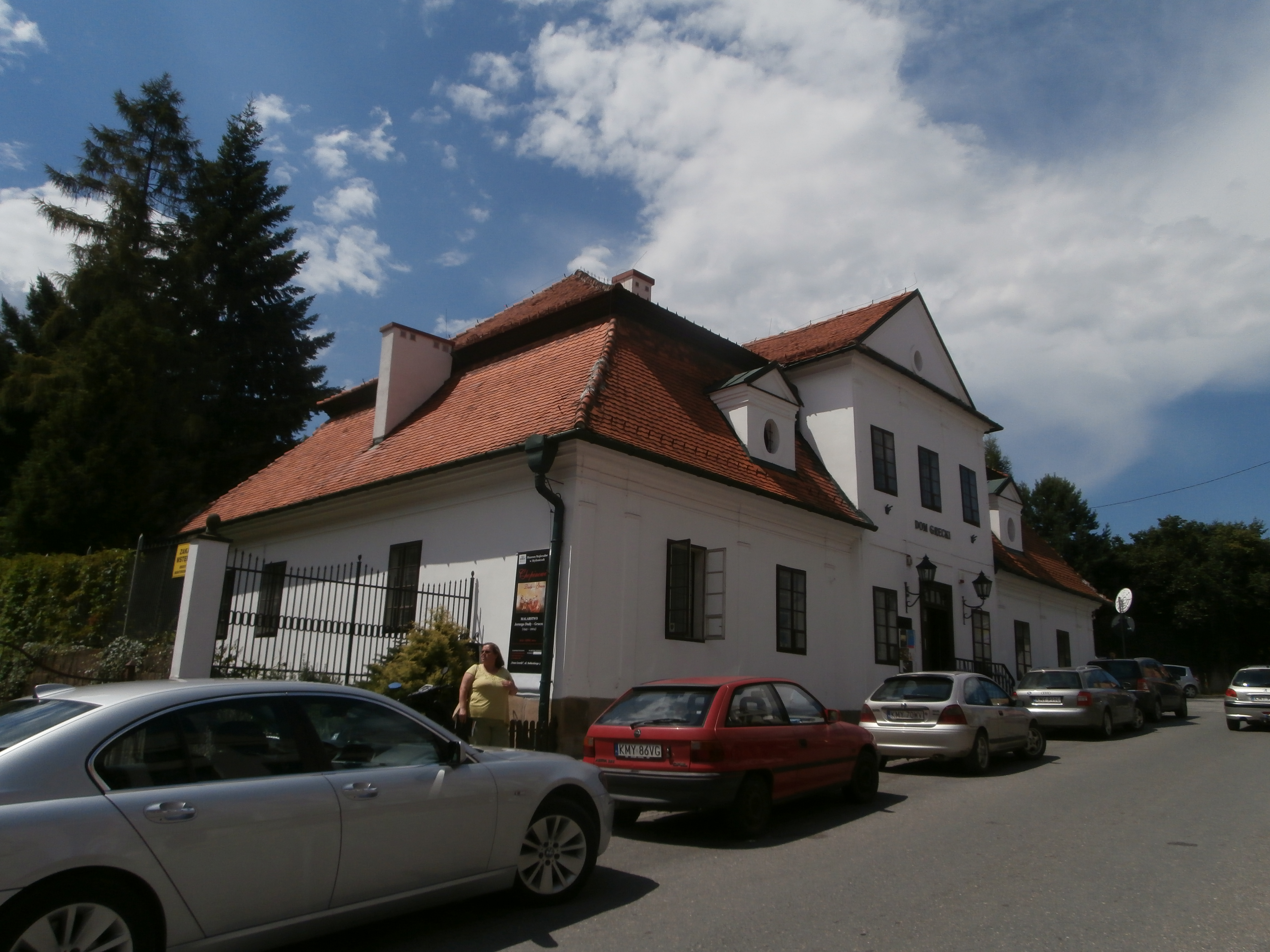 Dom Grecki w Myślenicach.